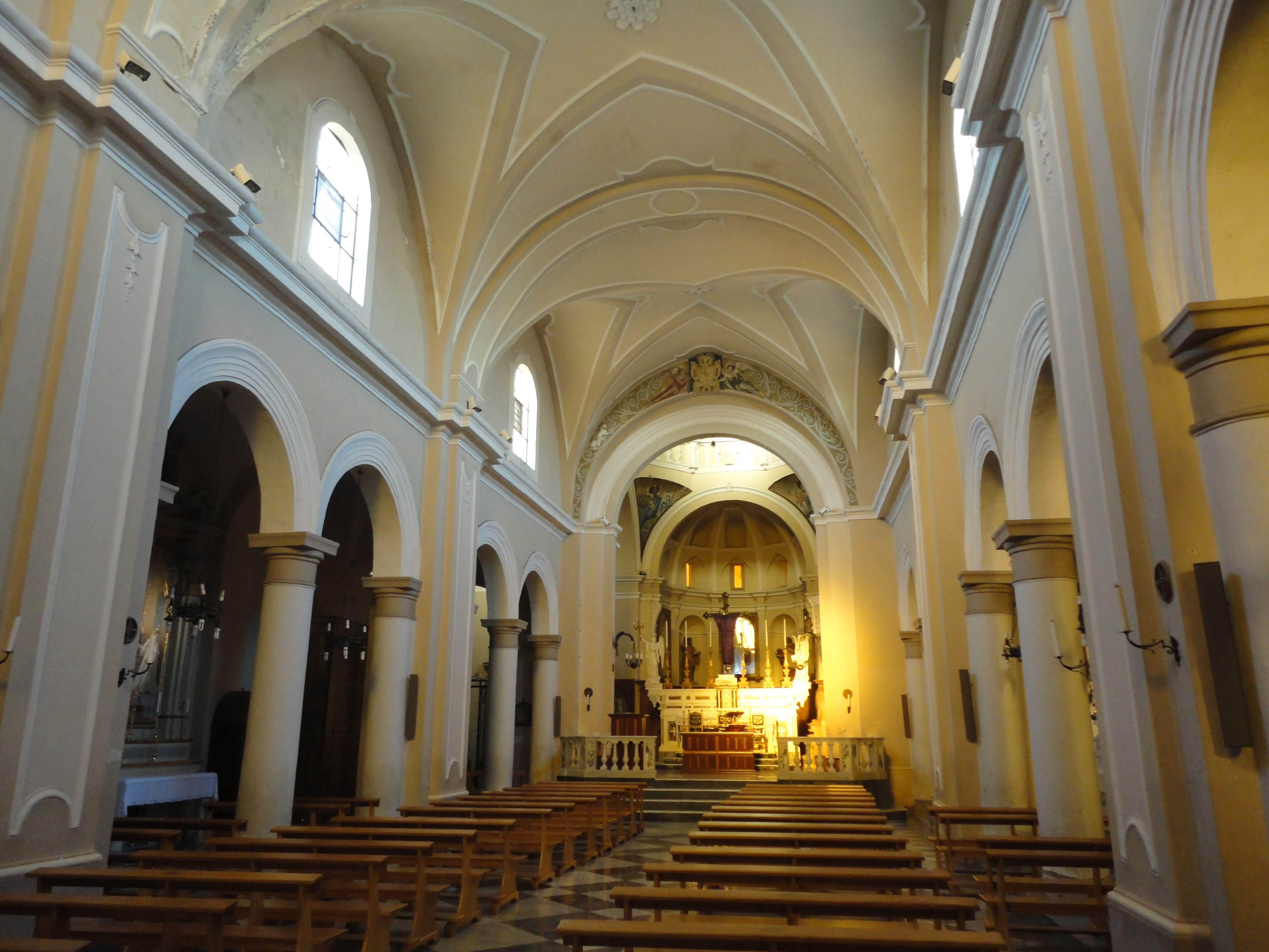 Interno chiesa madre di Parabita, Lecce